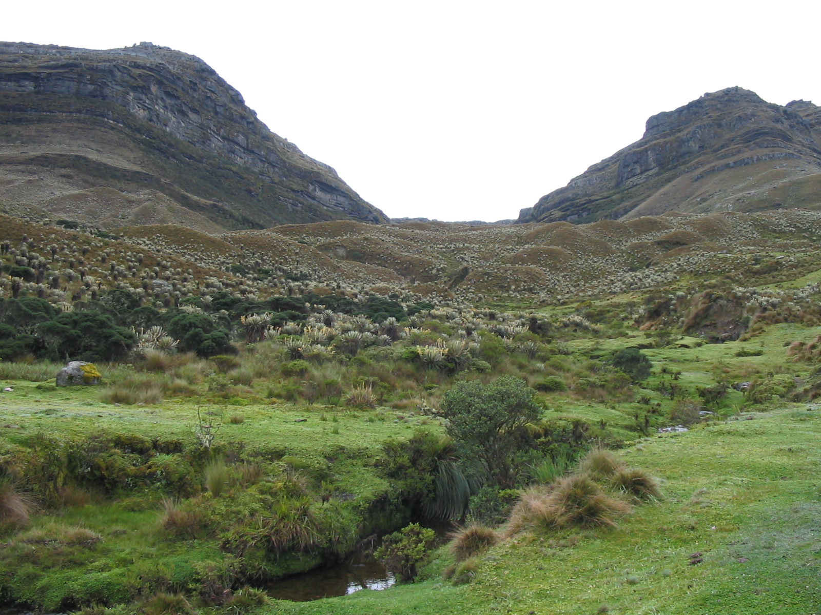 Páramo de Sumapaz en Colombia